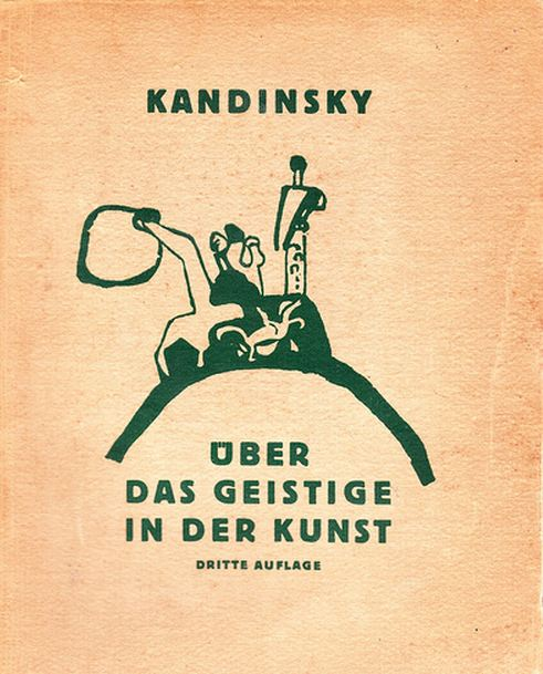 Portada del libro "De lo espiritual en el arte" de Wassily Kandinsky